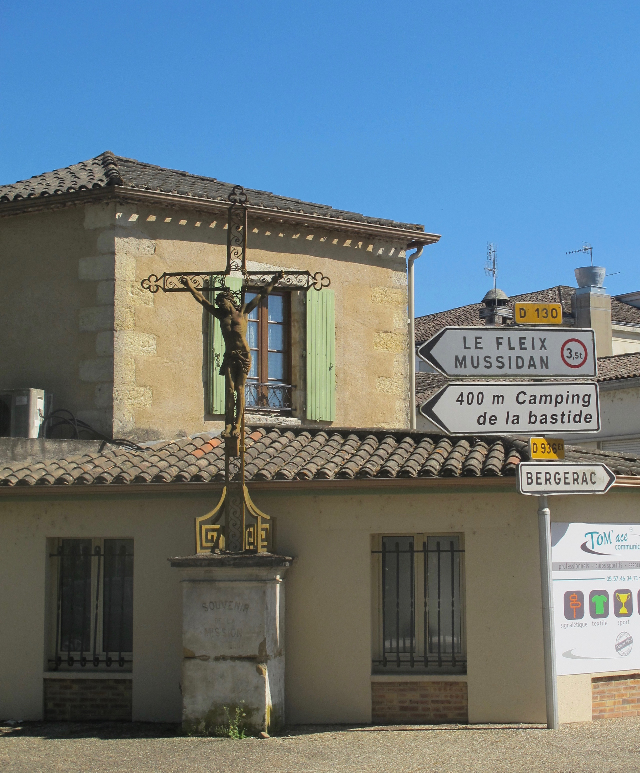 Croix monumentale, au croisement de l'avenue Georges-Clemenceau et de l'avenue Charrier, à Sainte-Foy-la-Grande (Gironde). Sur le socle est inscrit : "Souvenir de la Mission, 1880".